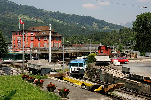 Bahnhof Arth-Goldau mit Werkgelände der Rigibahn, fotografiert am 23.06.2005